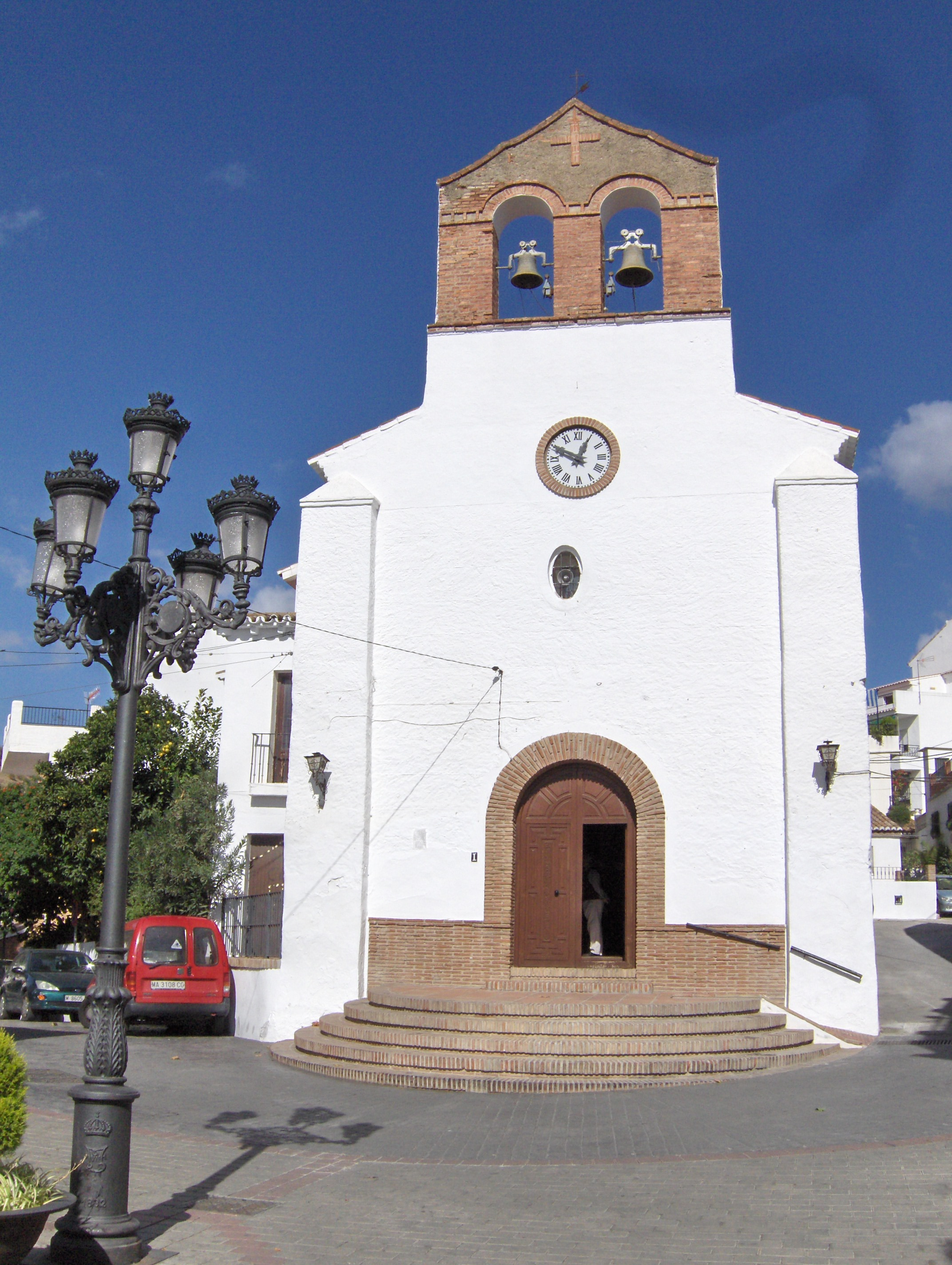 Iglesia de Nuestra Señora de la Candelaria, Benagalbón, Rincón de la Victoria, España.